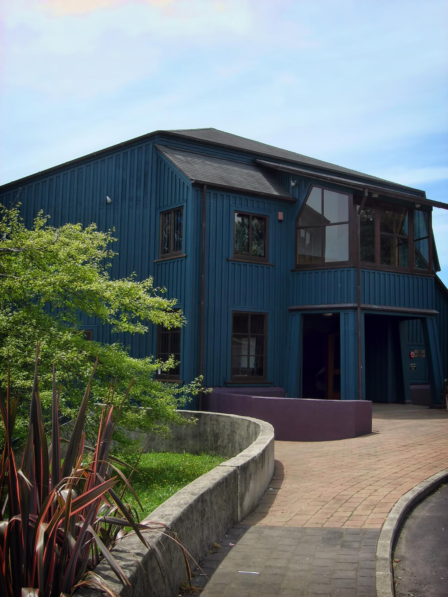 Michael Park: Aucklands Waldorfschule